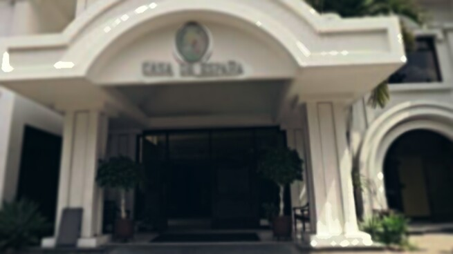 Casa España en San José